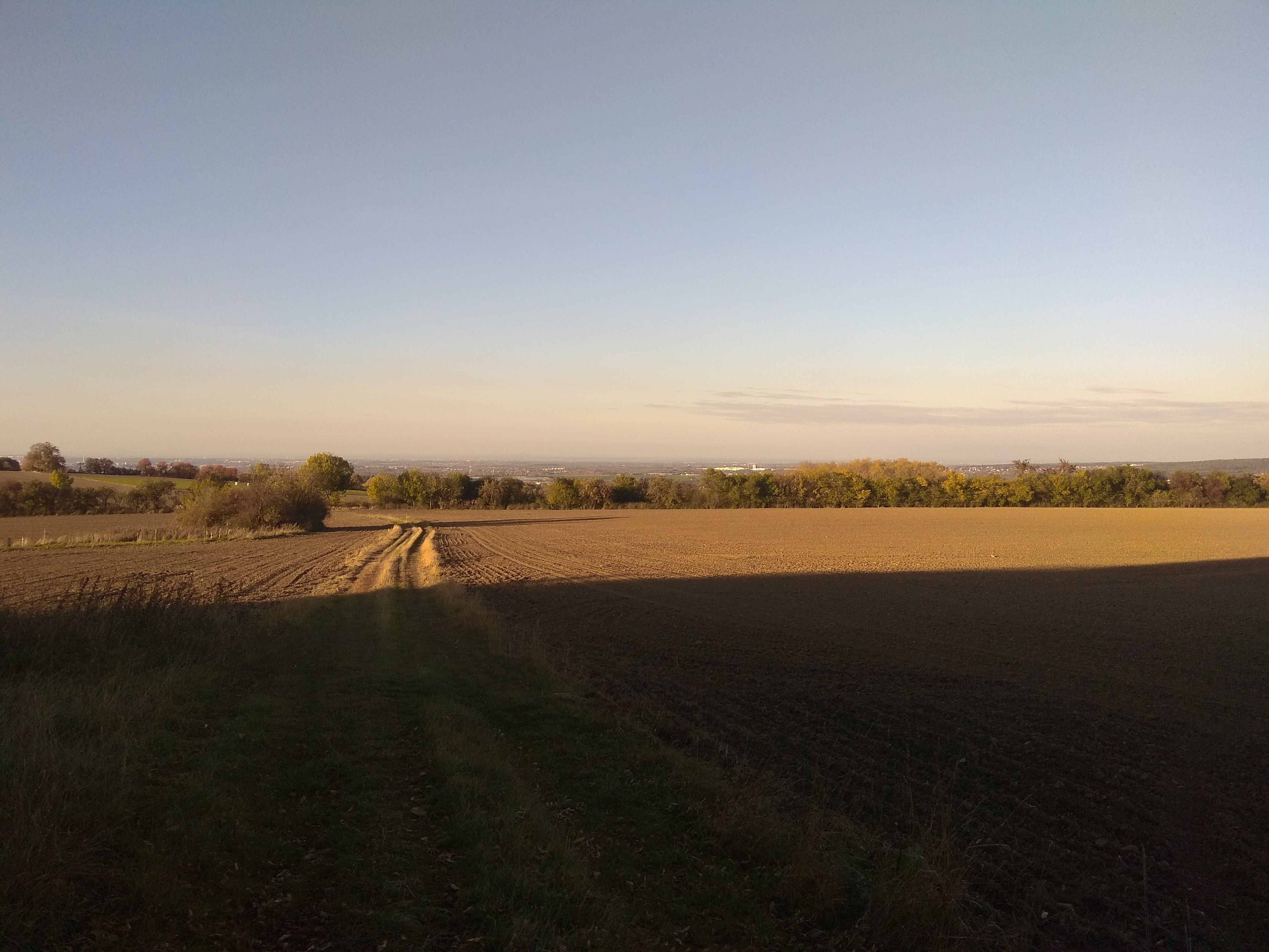 Výhled z Radimovky, kopce nedaleko obce Petříkov v okrese Praha-východ